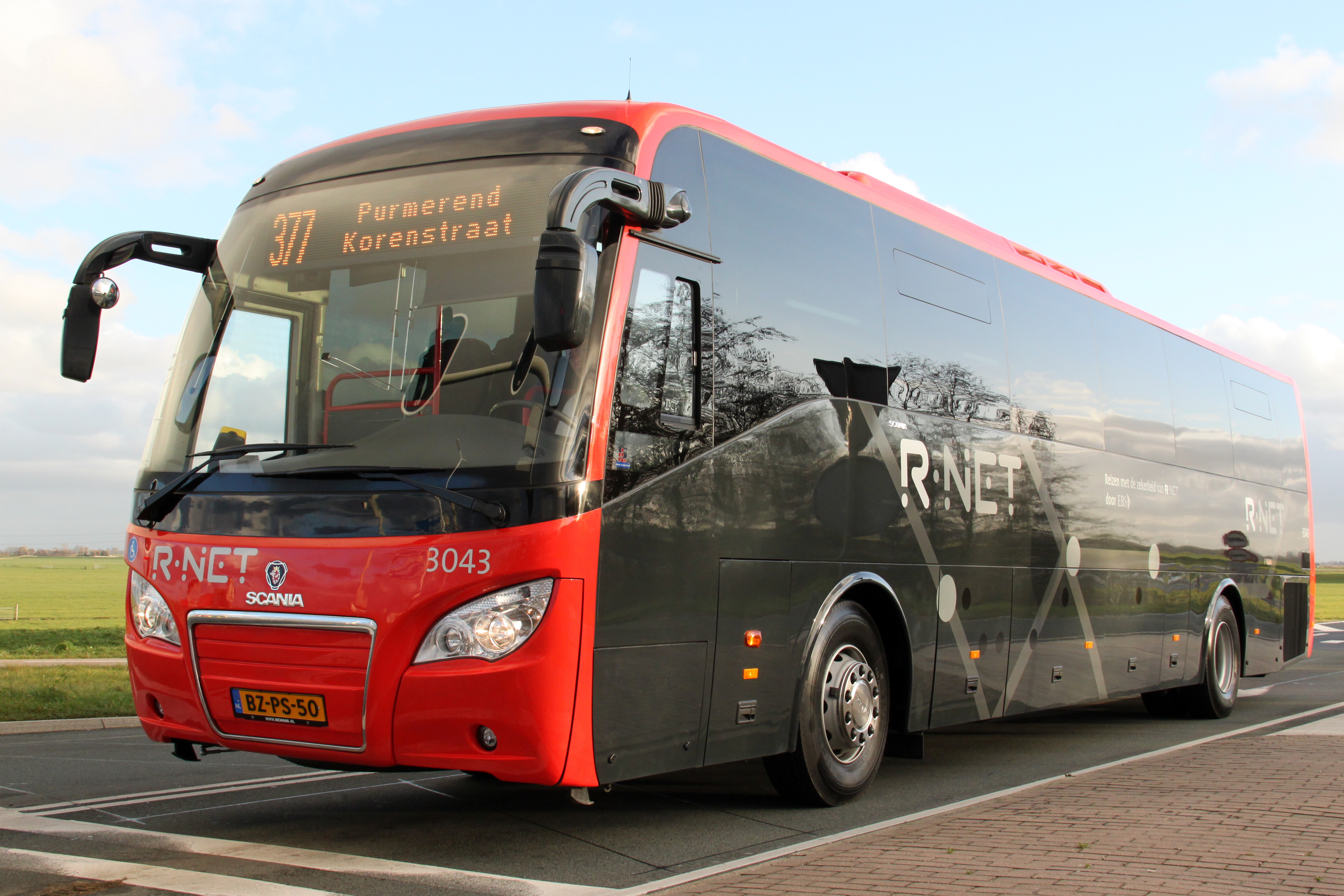 Een Scania Higer A30 als Bizzliner 377 op weg van Amsterdam Zuidoost richting Purmerend, ter hoogte van Het Schouw, Splitsing.